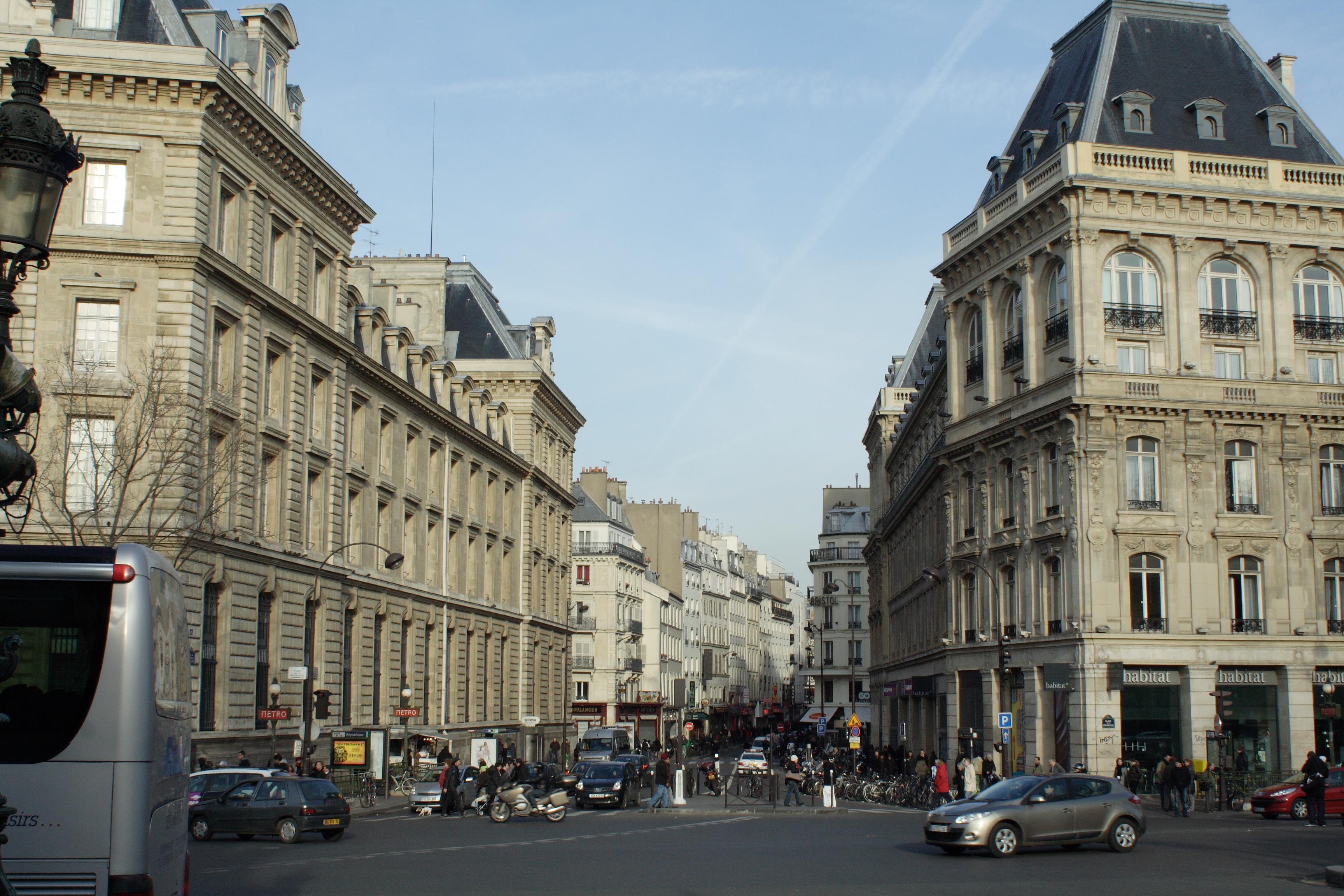 Début de la rue du Faubourg-du-Temple, place de la République (Paris).